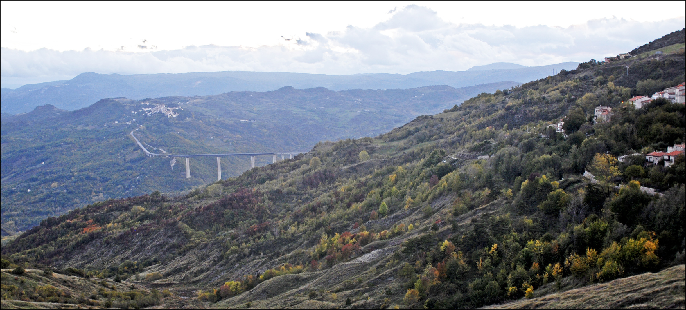 Il ponte più alto d'Italia